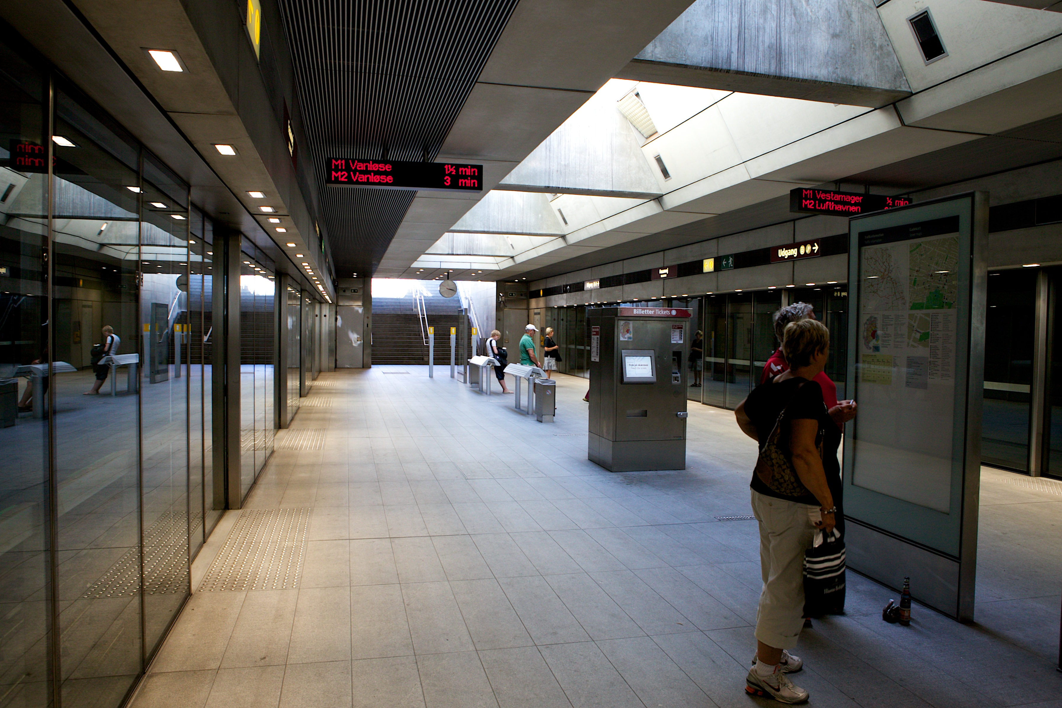 Fasanvej Metrostation, set indefra.